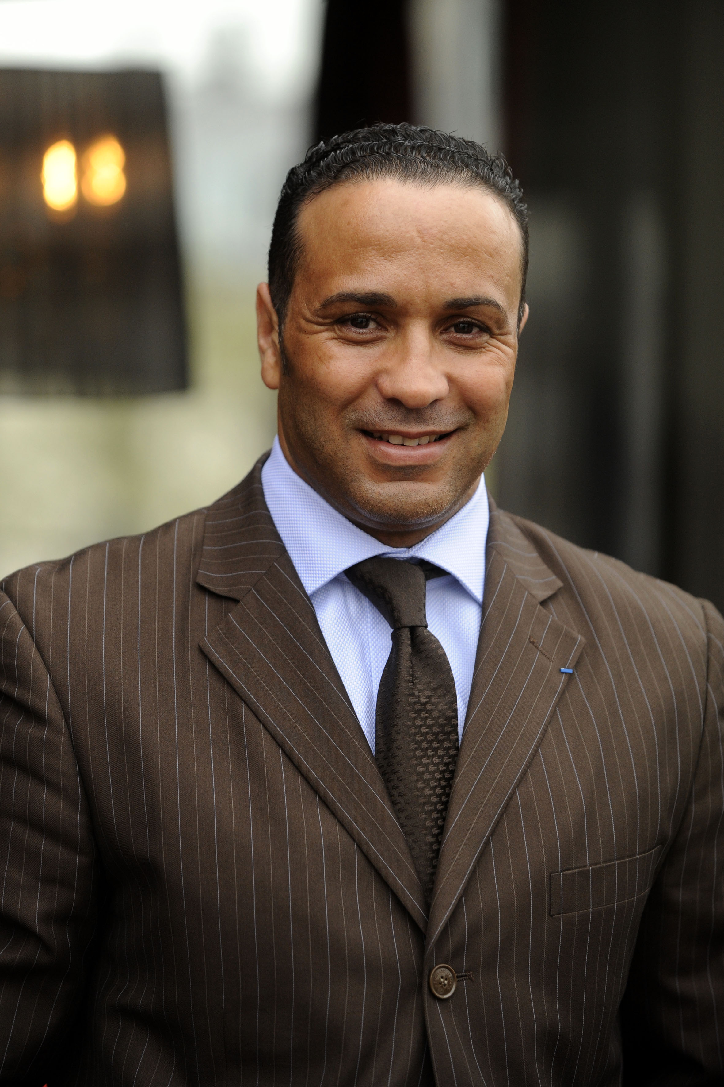 Ghani Yalouz, Directeur Technique National à la Fédération Française d'Athlétisme.